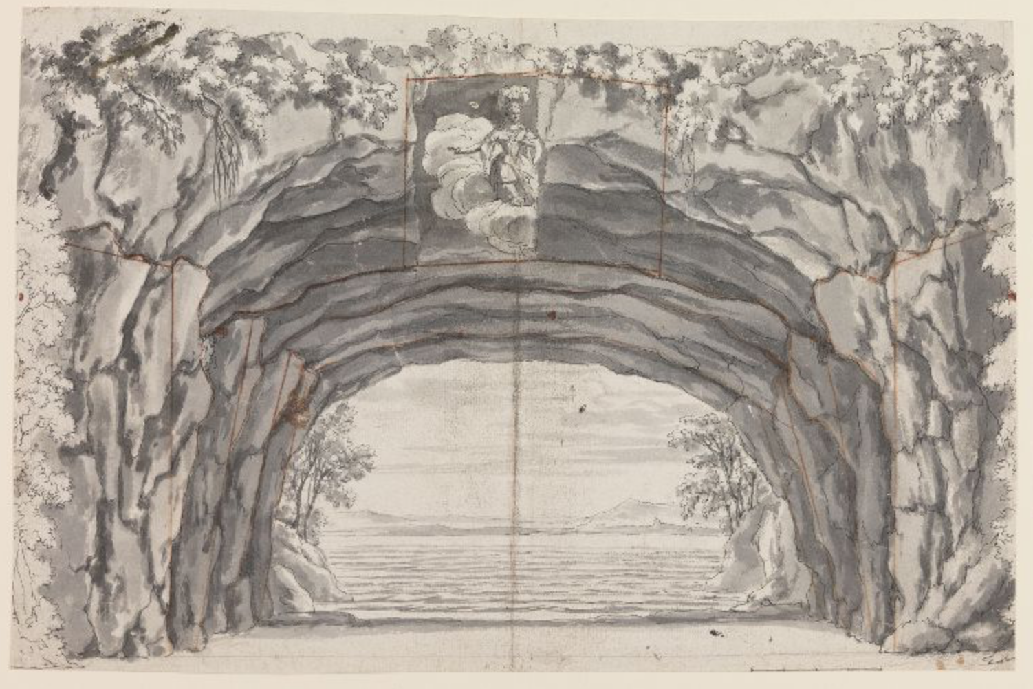 Entwurf zu einem Bühnenbild: Der geliebte Adonis (Oper von Reinhard Keiser), Hamburg 1697 von Johann Oswald Harms, (I. Akt, Szene 1): Höhle. Vier Linkskulissen. Prospekt und vier Rechtskulissen